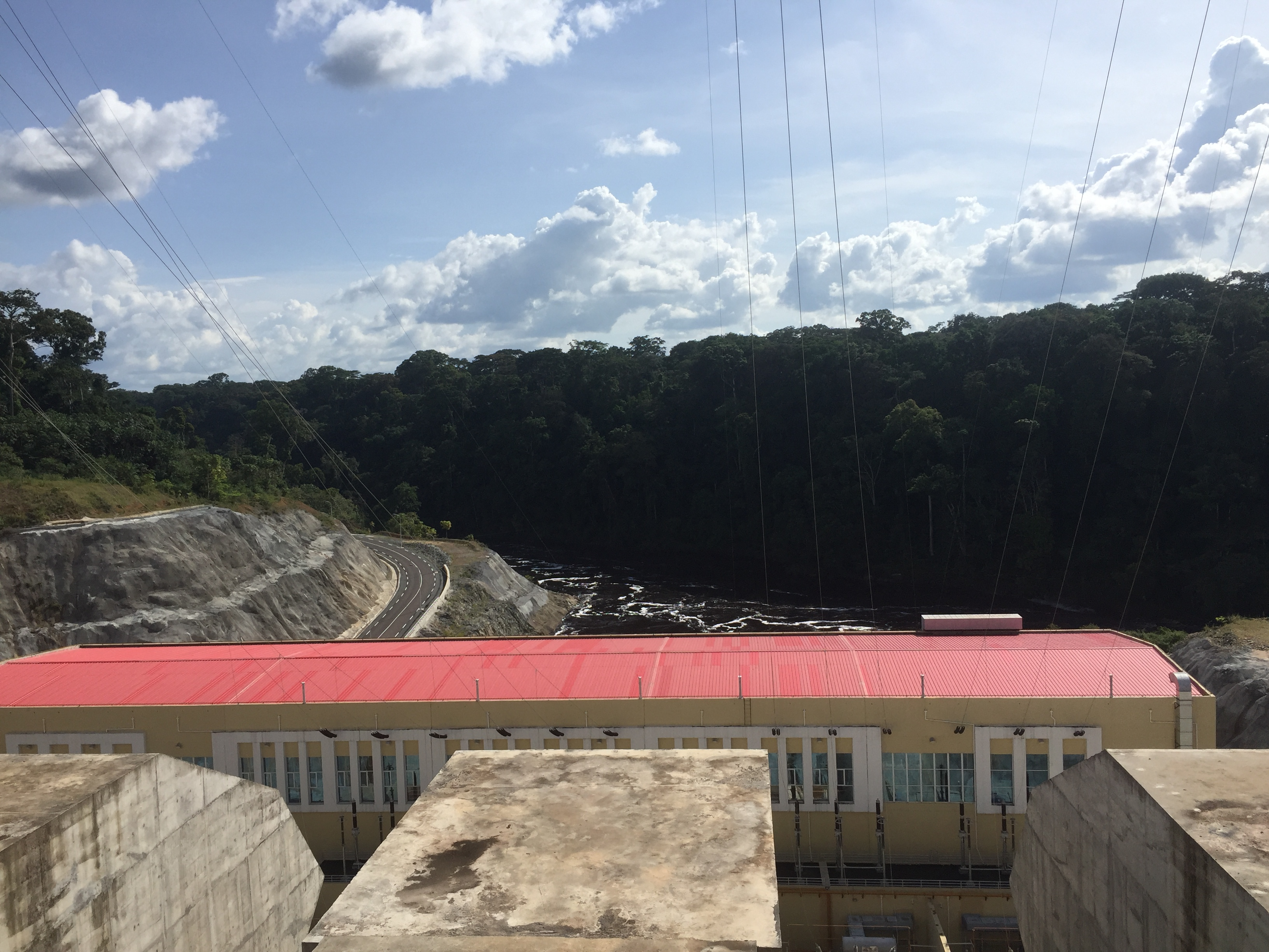 Cette image montre un paysage du barrage hydroélectrique de Memve'ele sur le versant du fleuve Ntem dans la région du Sud Cameroun